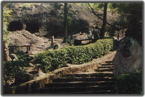 Komplek Pertapaan Gua Selomangleng, Kota Kediri